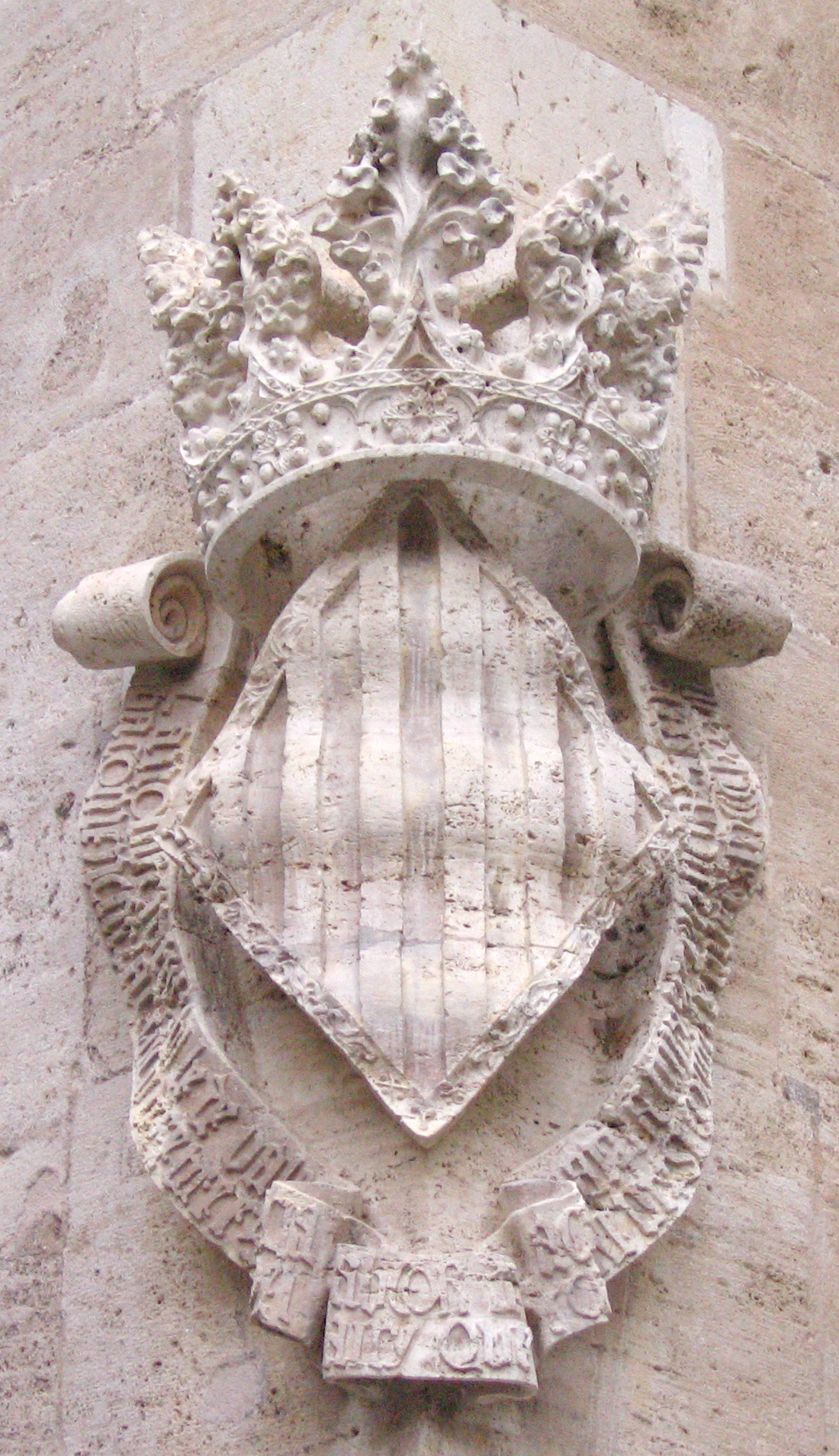 Escut Reial de València en la Llotja de la Seda (València)